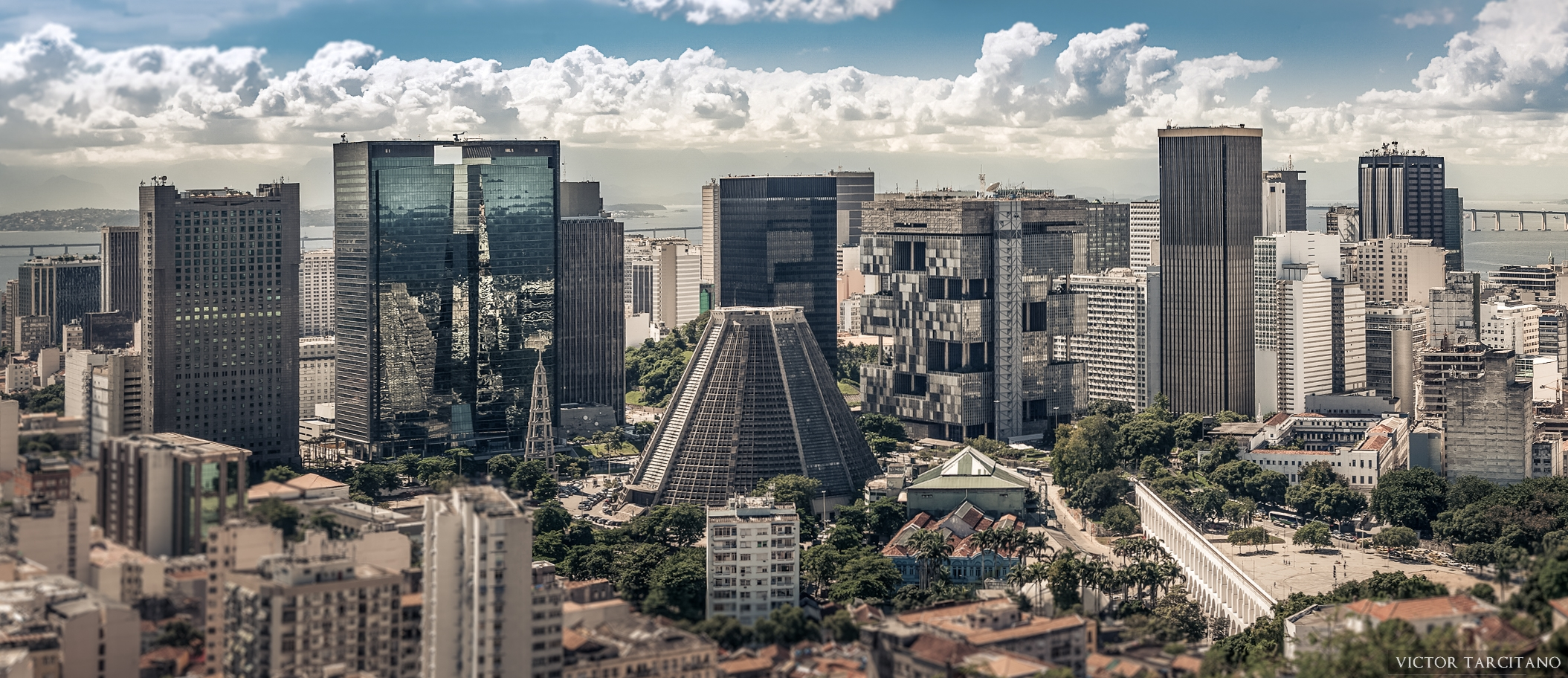 Vista do Centro do Rio de Janeiro tirada do museu chácara do céu